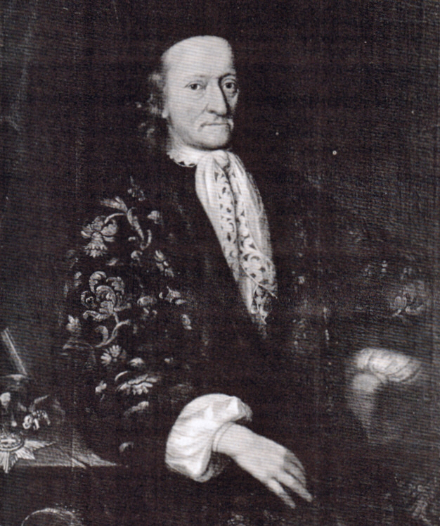 Detlev von Ahlefeldt zu Haseldorf, Haselau und Kaden (1617 – 1686), Diplomat und als Memoirenschreiber in die schleswig-holsteinische Literaturgeschichte eingegangen